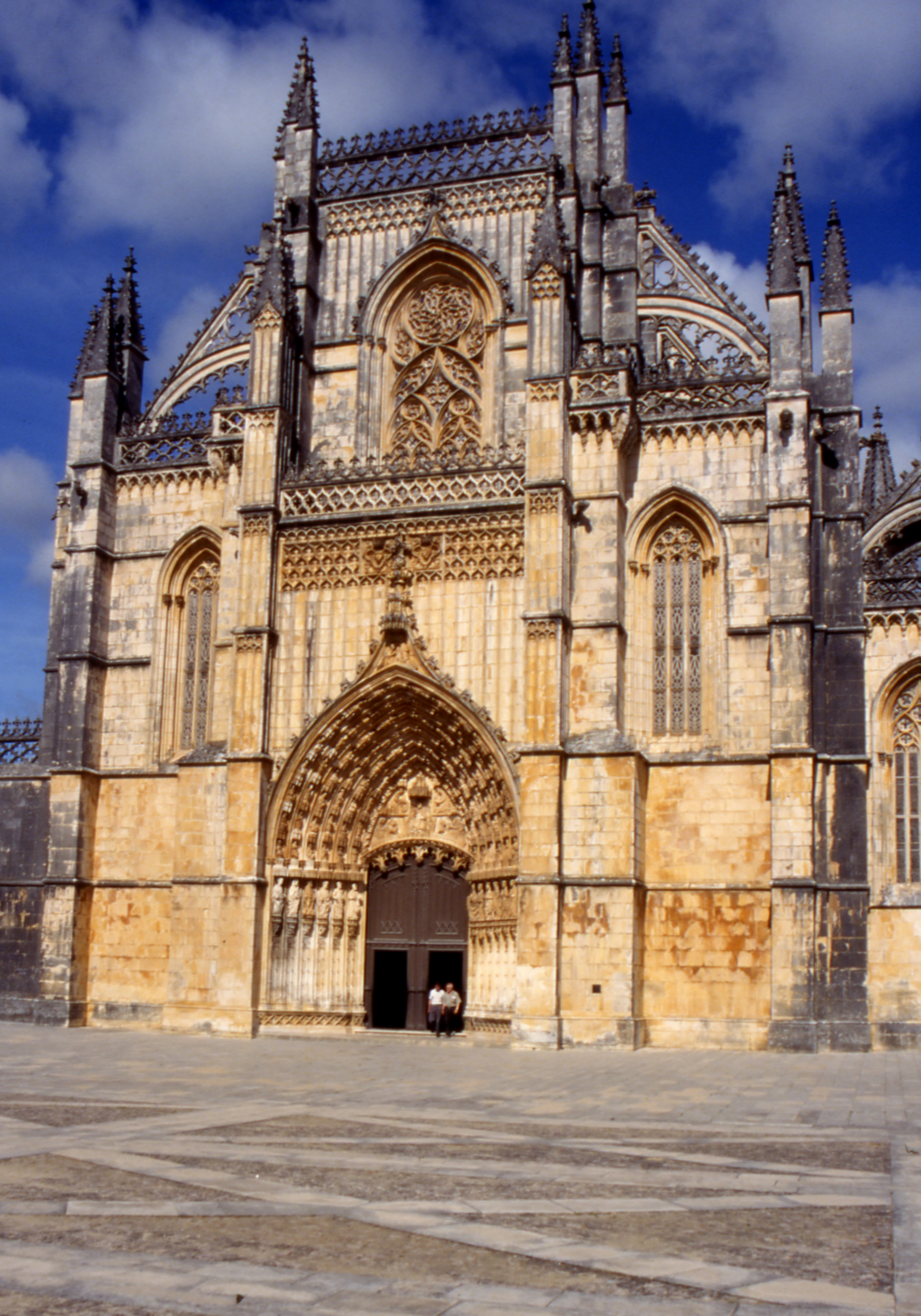 Mosteiro da Batalha Portal